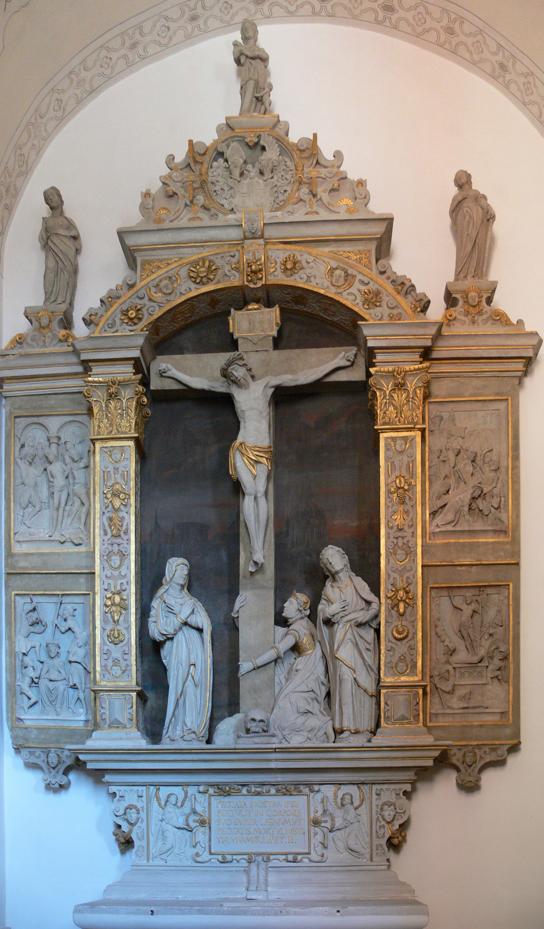 Westvorhalle der Stiftsbasilika St. Vitus, Ellwangen (Jagst) Kreuzaltar, Hans und Matthäus Schamm (Ottobeuren) zugeschrieben, um 1610. Schreinfiguren: Kruzifix, Maria, Johannes und Magdalena